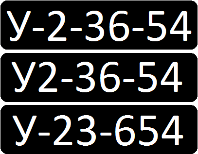 Военные номера 1940-1960 годов.